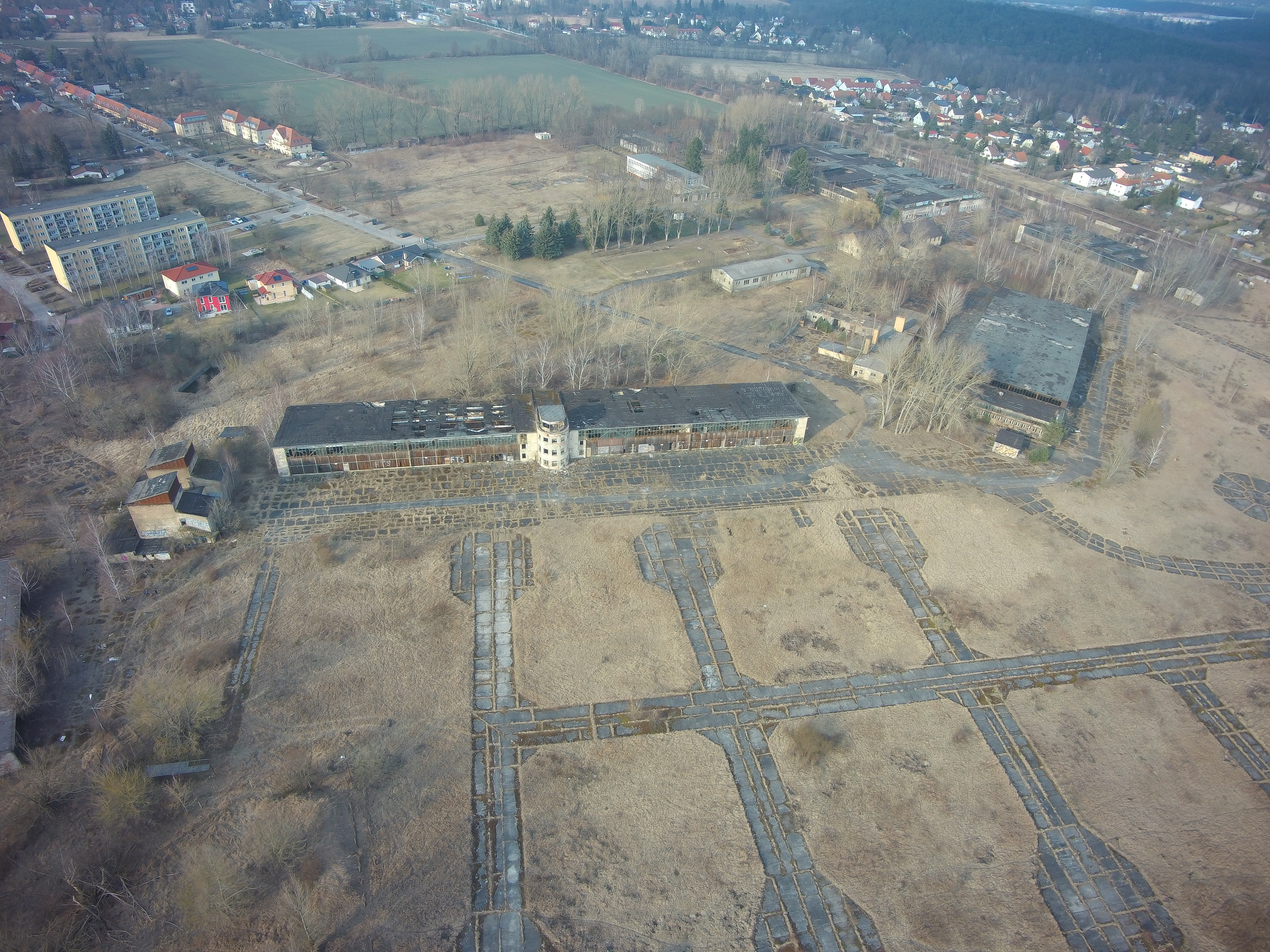 Flugplatz Rangsdorf, Ansicht des Flugfeldes, der Einfliegerhalle und der ehem. Produktionshallen gegen Norden